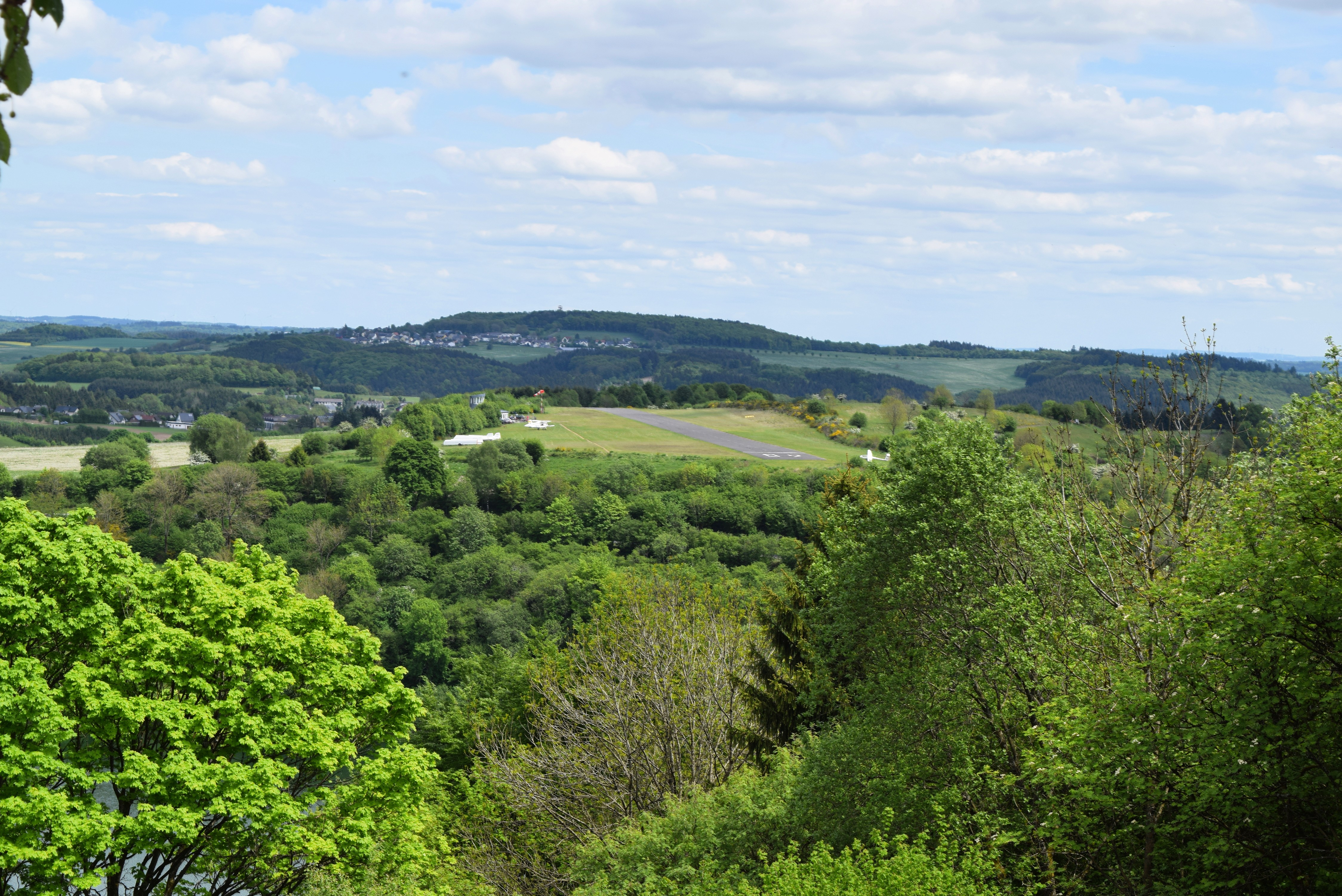 Flugplatz Schalkenmehren (2017)